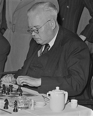 Original image description from the Deutsche Fotothek Schachspieler Ludwig Rellstab aus Hamburg bei den Deutschen Schachmeisterschaften